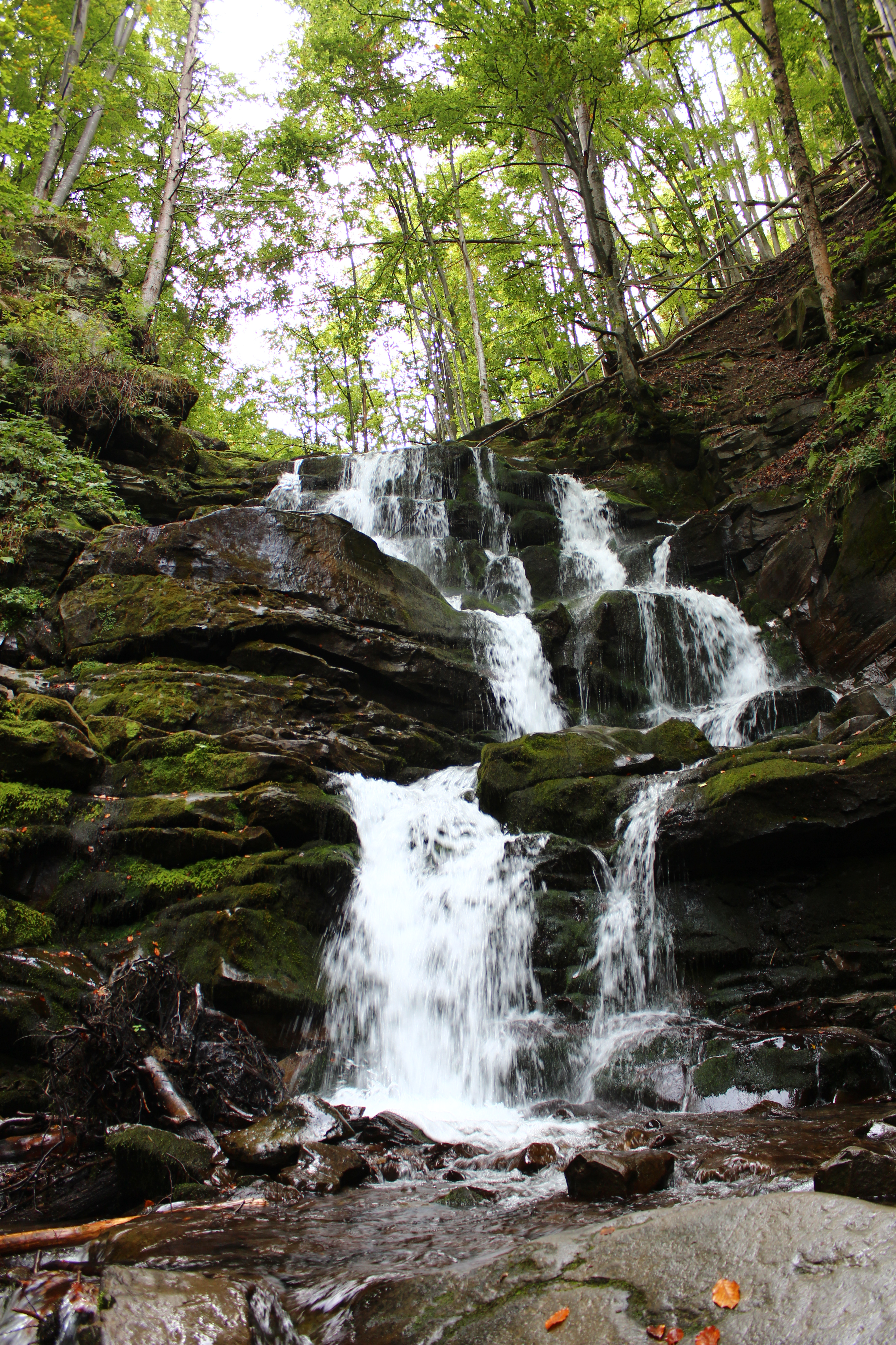 Водоспад Шипіт